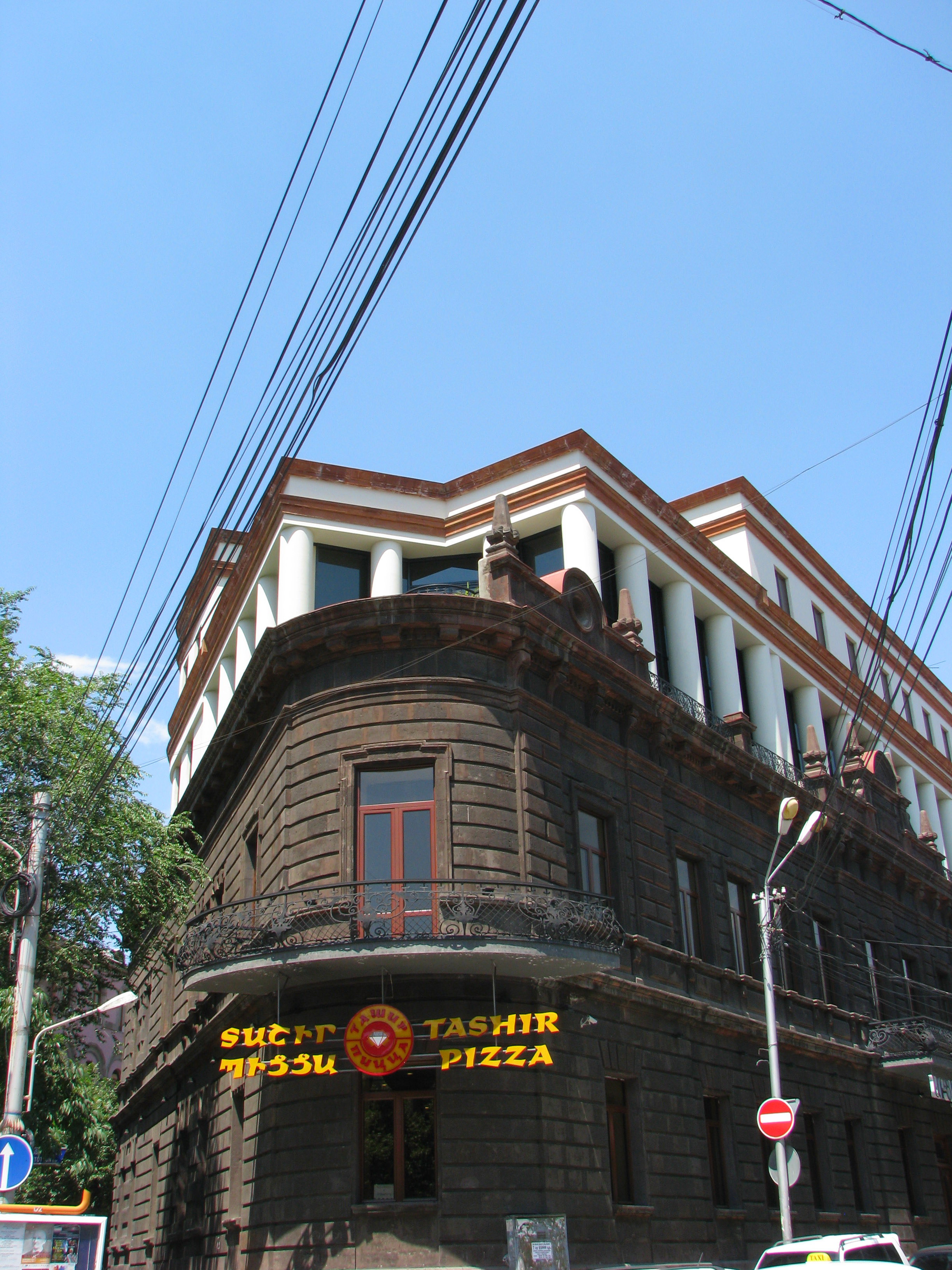 1918 թ. այս պատշգամբից Արամ Մանուկյանը հռչակել է Հայաստանը նորանկախ հանրապետություն: 6/203.8